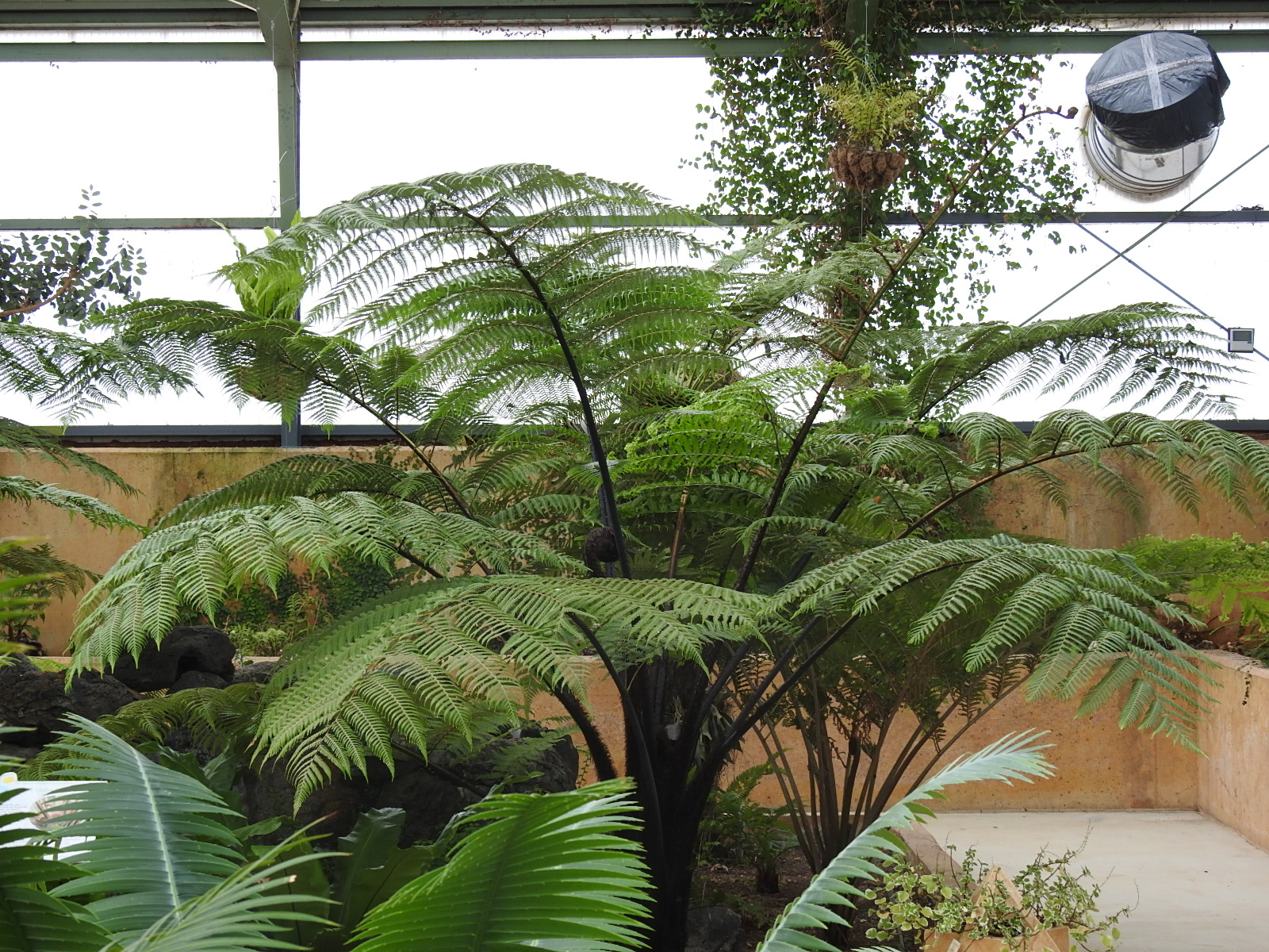 El helecho arborescente Cyathea medullaris en el invernadero de exposición del JBCLM.